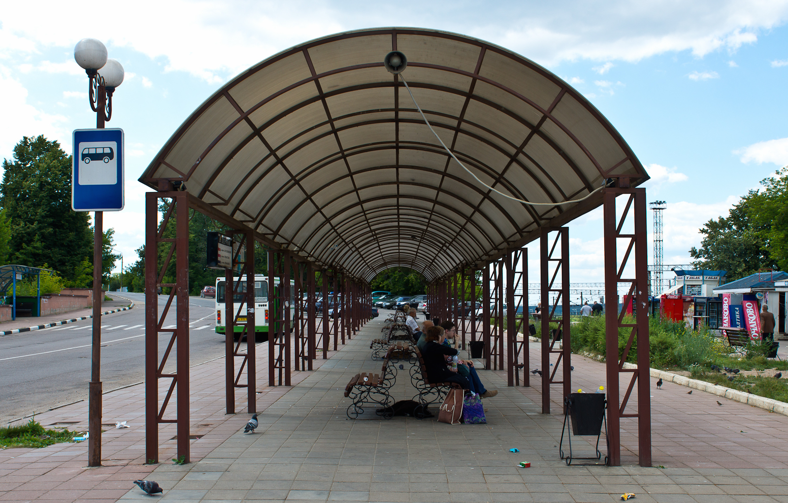 Город Кашира